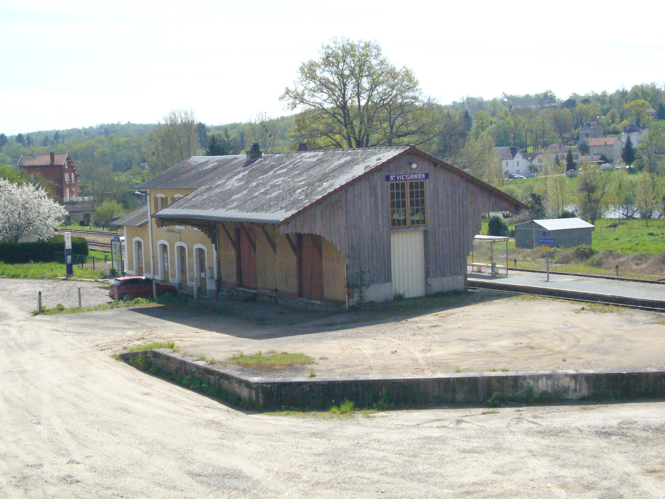 Gare de Saint-Victurnien, Haute-VIenne, France